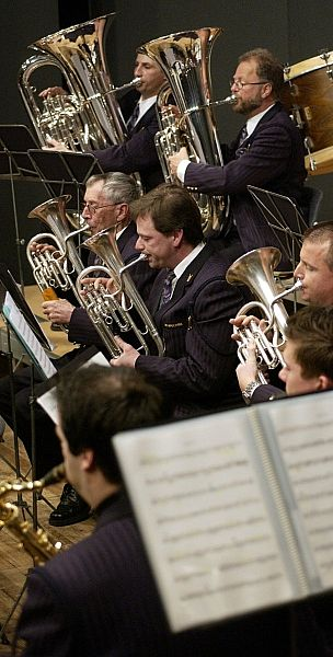 Die Musikgesellschaft Walchwil am Jahreskonzert 2005. Blechregister, Posaunen, Bass, Tuba und Hörner